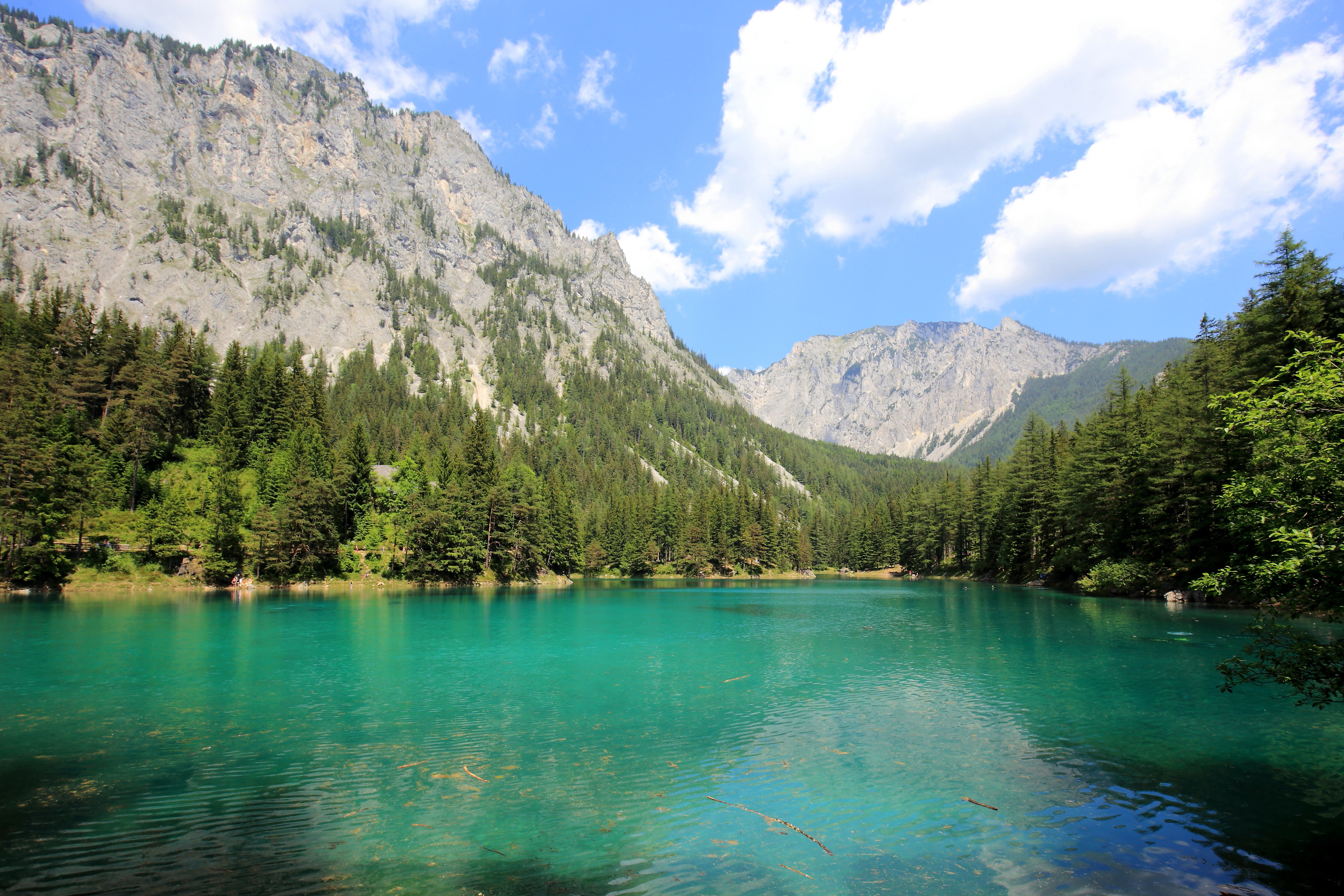 Südwestansicht des Grünen Sees in Tragöß. Im Hintergrund der 1835 hohe Berg Meßnerin und links die Flanke des 1579 m hohen Pribitz. This media shows the nature reserve in Styria with the ID NSG 19 a.